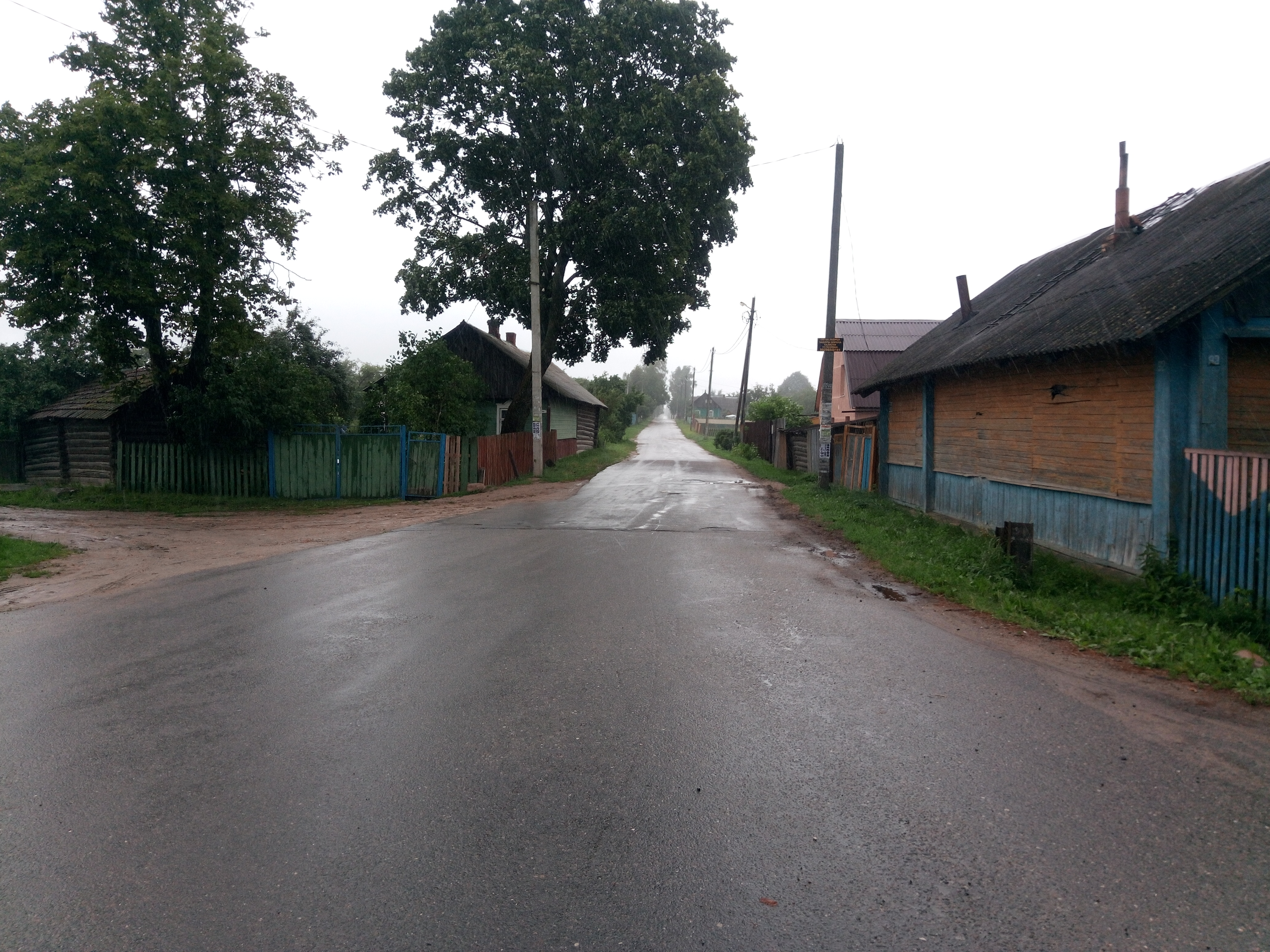 Дукора. Вуліца Блажко